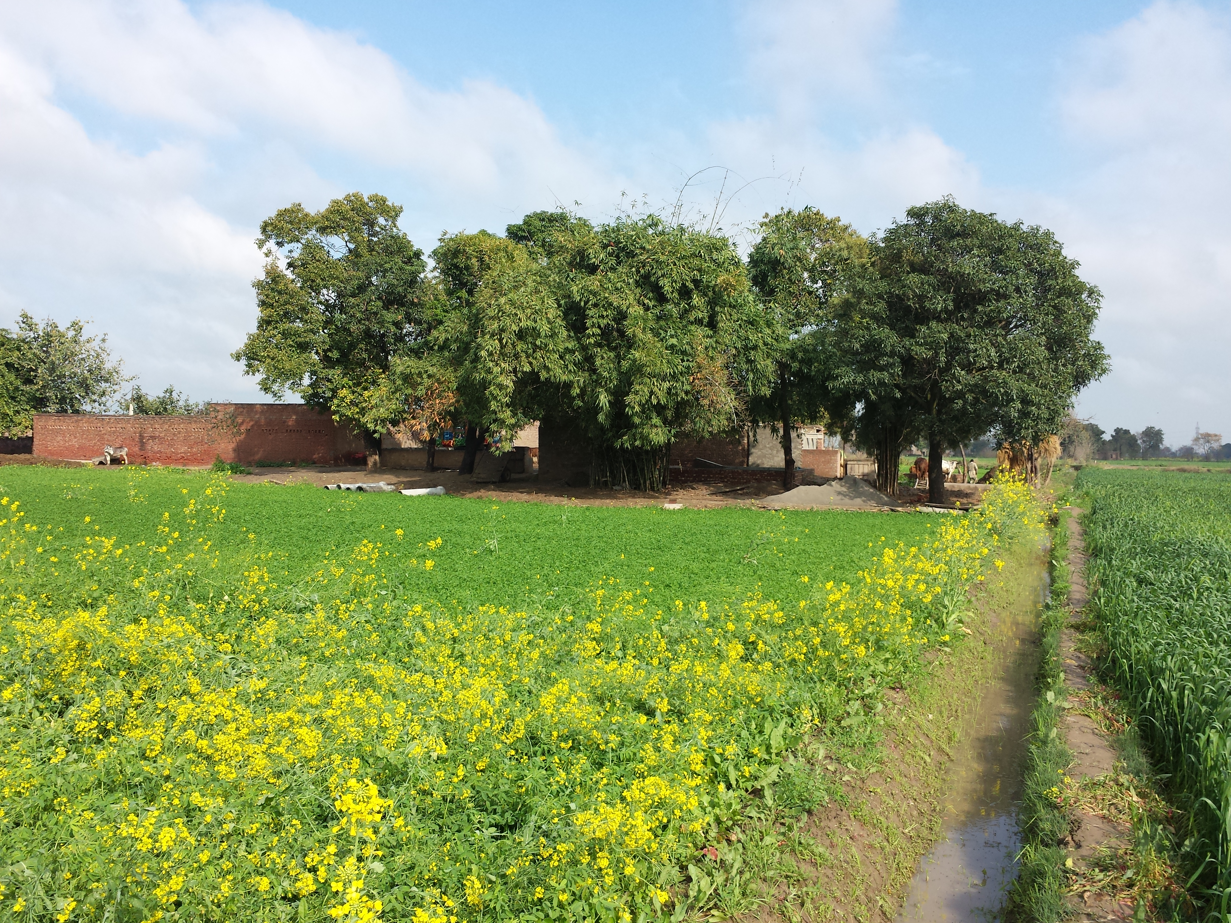 Hassan Wali, Pakistan